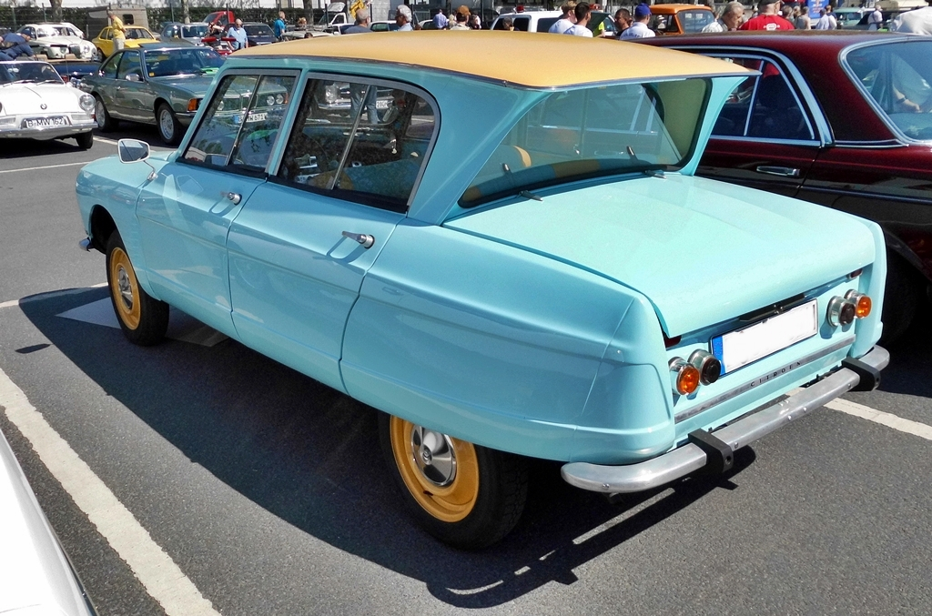 Oldtimer Berlin 2016